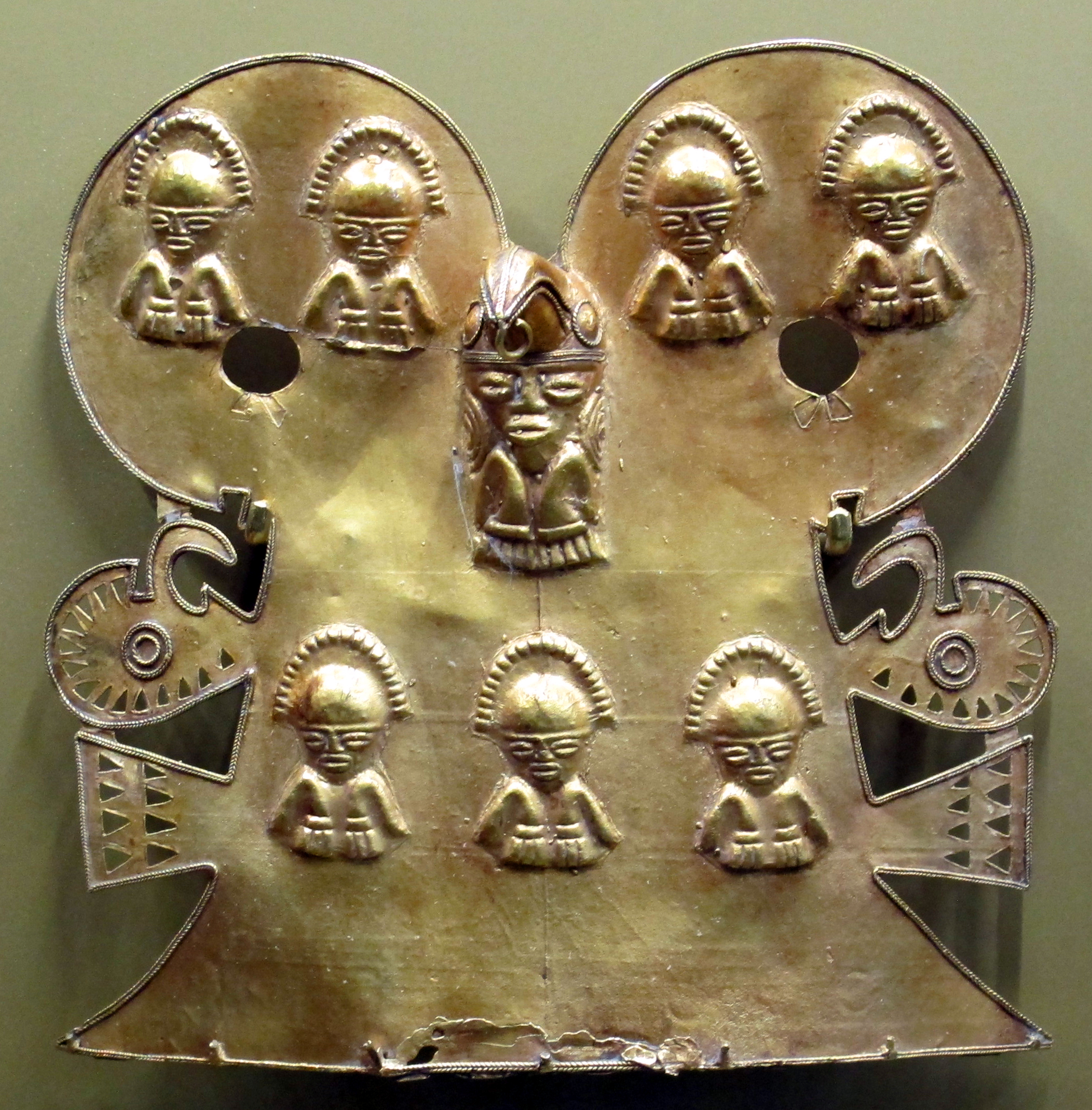 Musei della biblioteca Apostolica Vaticana